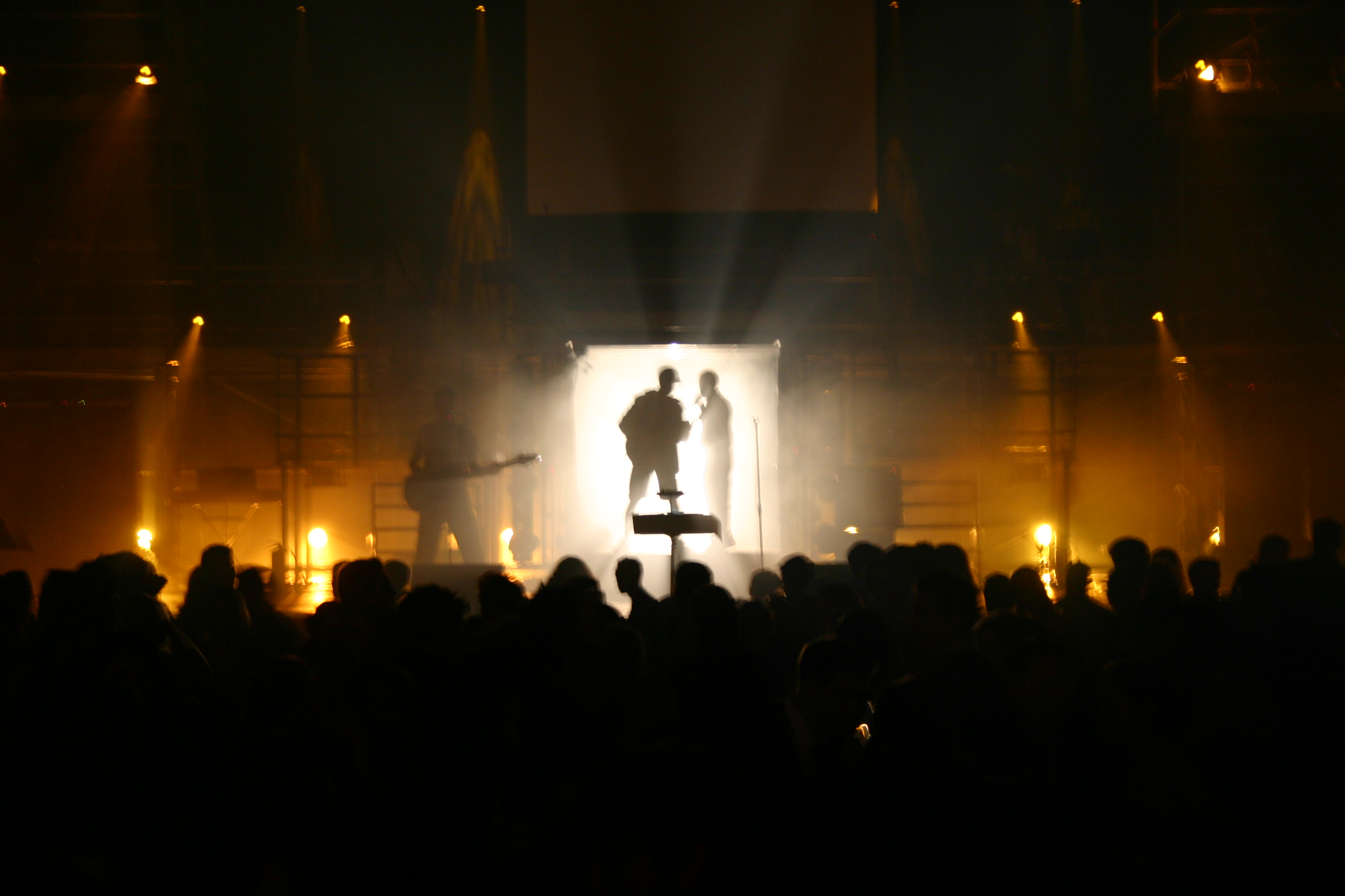 D'Providers um Lécker Bal 2005.